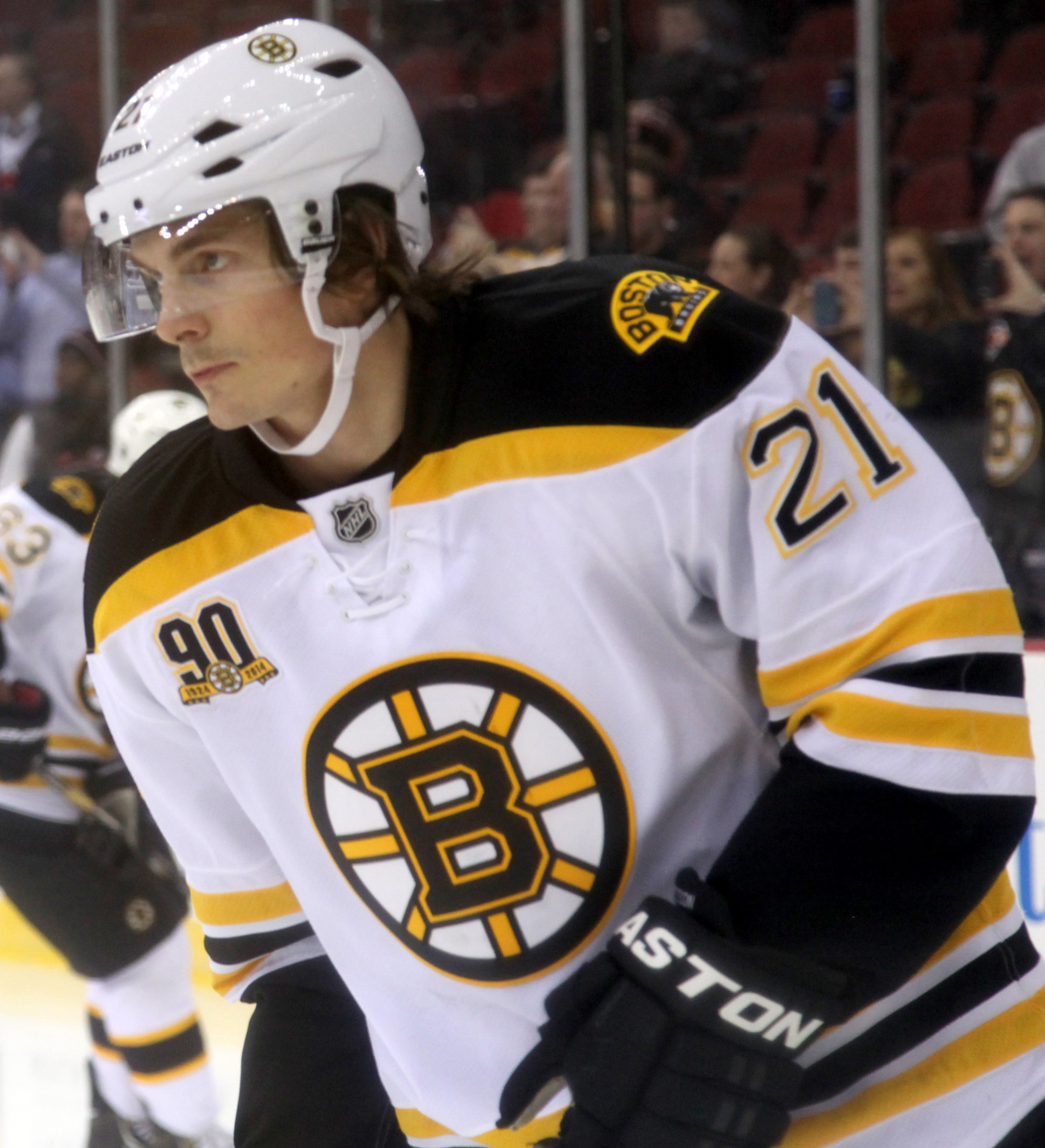 Loui Eriksson in 2014.